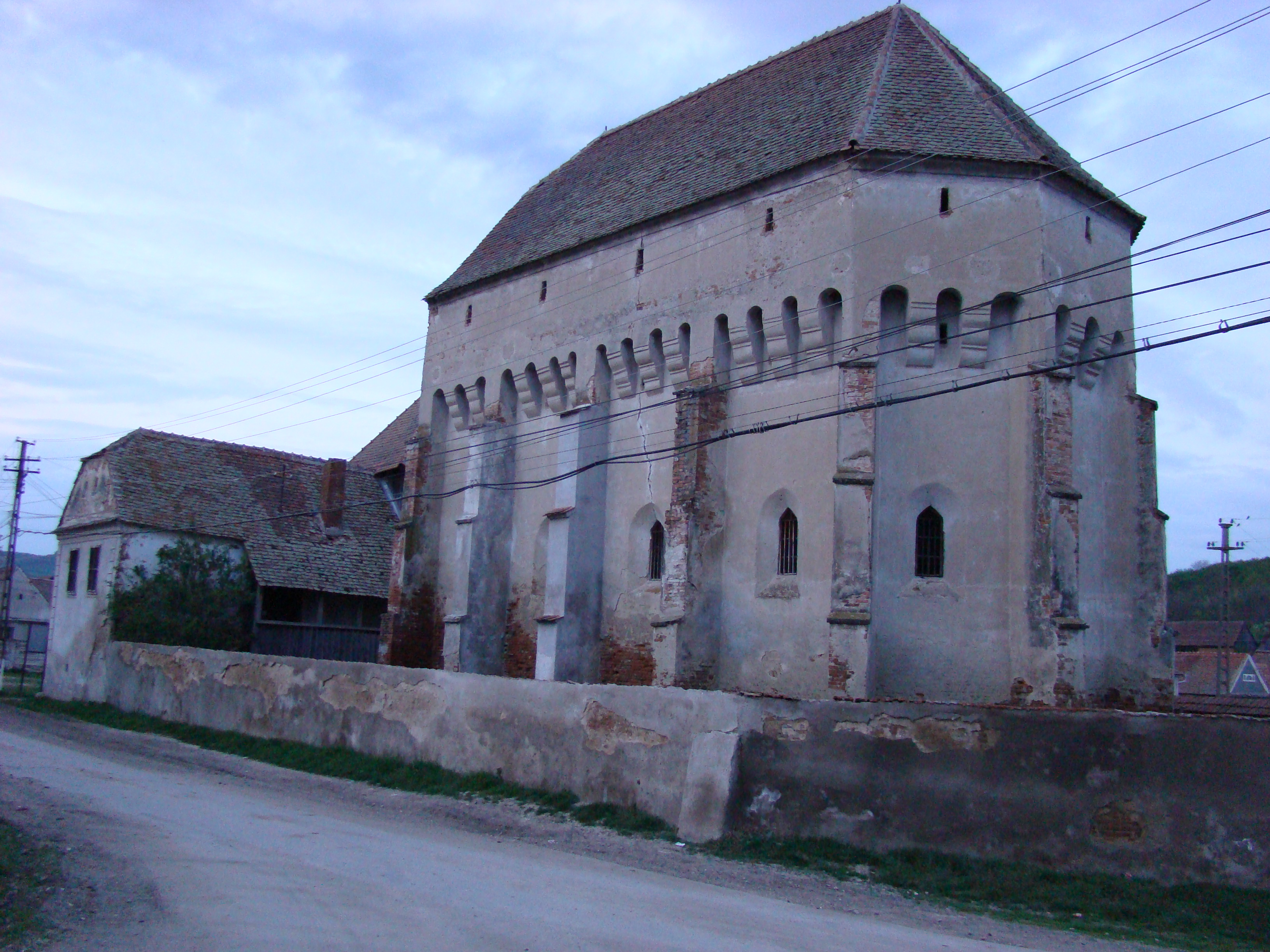 Wehrkirche in Boz (Bußd), Alba, Siebenbürgen, Rumänien